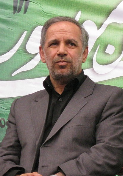 Jamshid Ansari